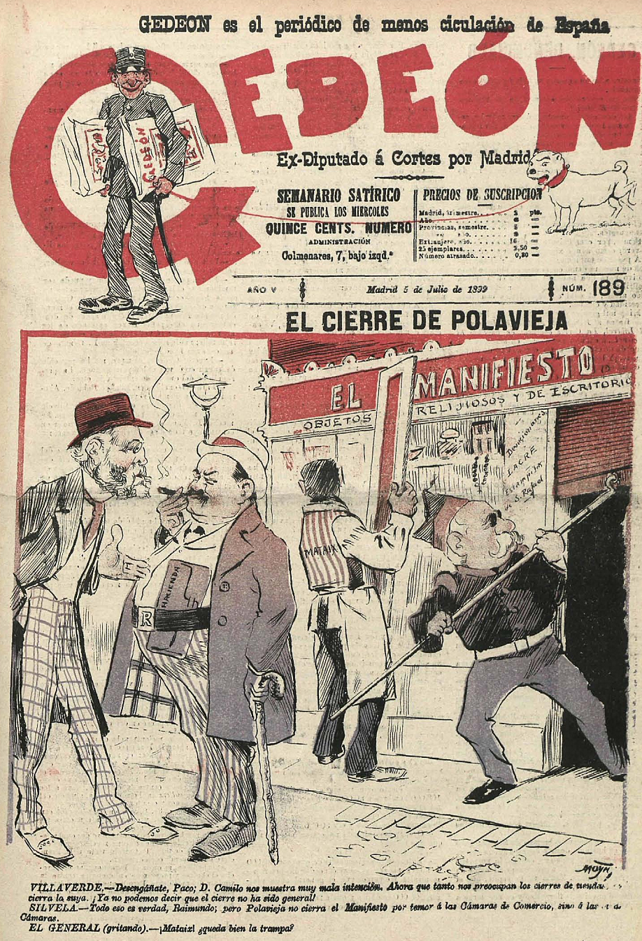 El cierre de Polavieja, en la revista satírica española Gedeón.